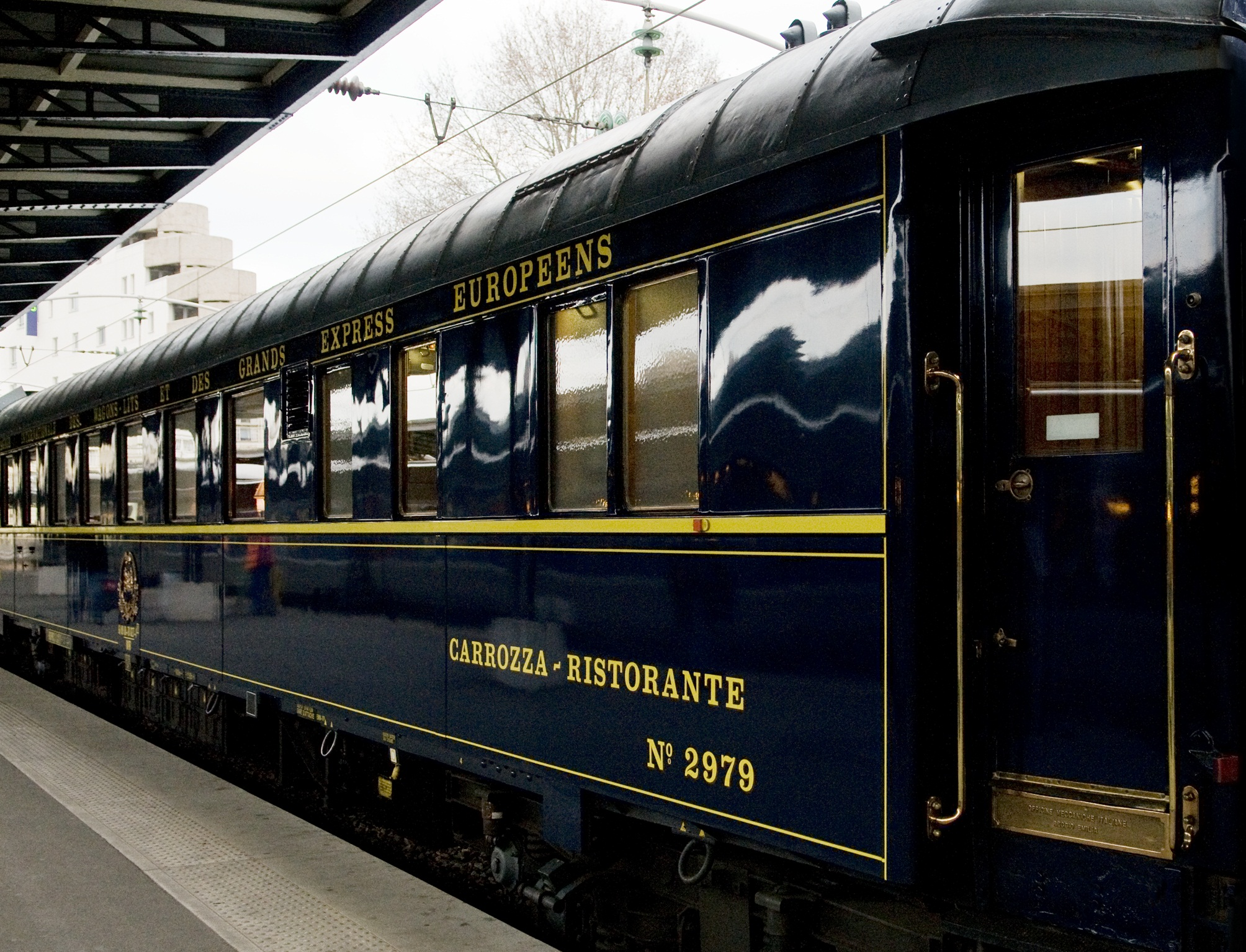 Vue extérieure de l'Orient Express SNCF